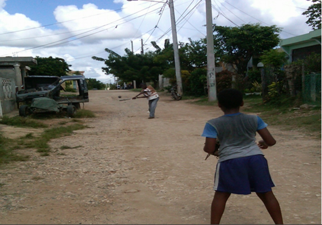 deportes en altos de san pedro